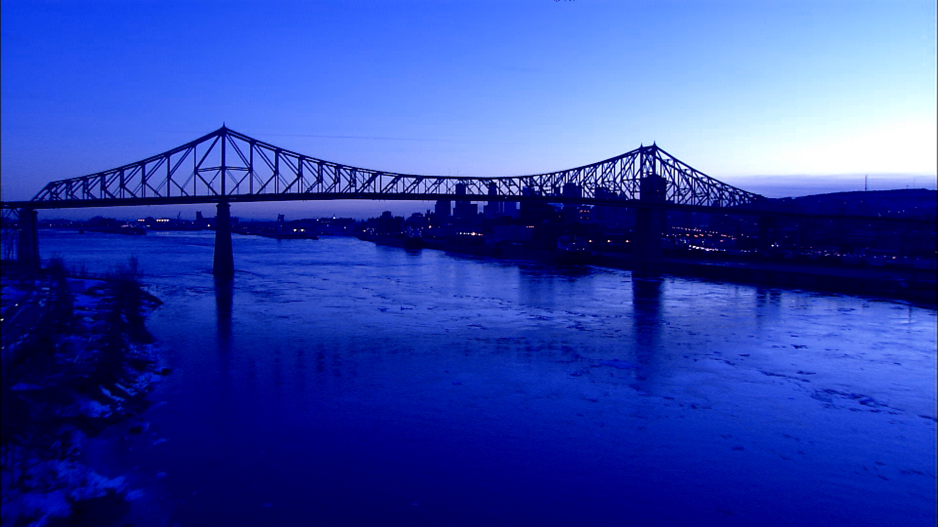 Pont Jacques Cartier Montréal / Jacques Cartier Bridge in Montreal, Québec (Canada)